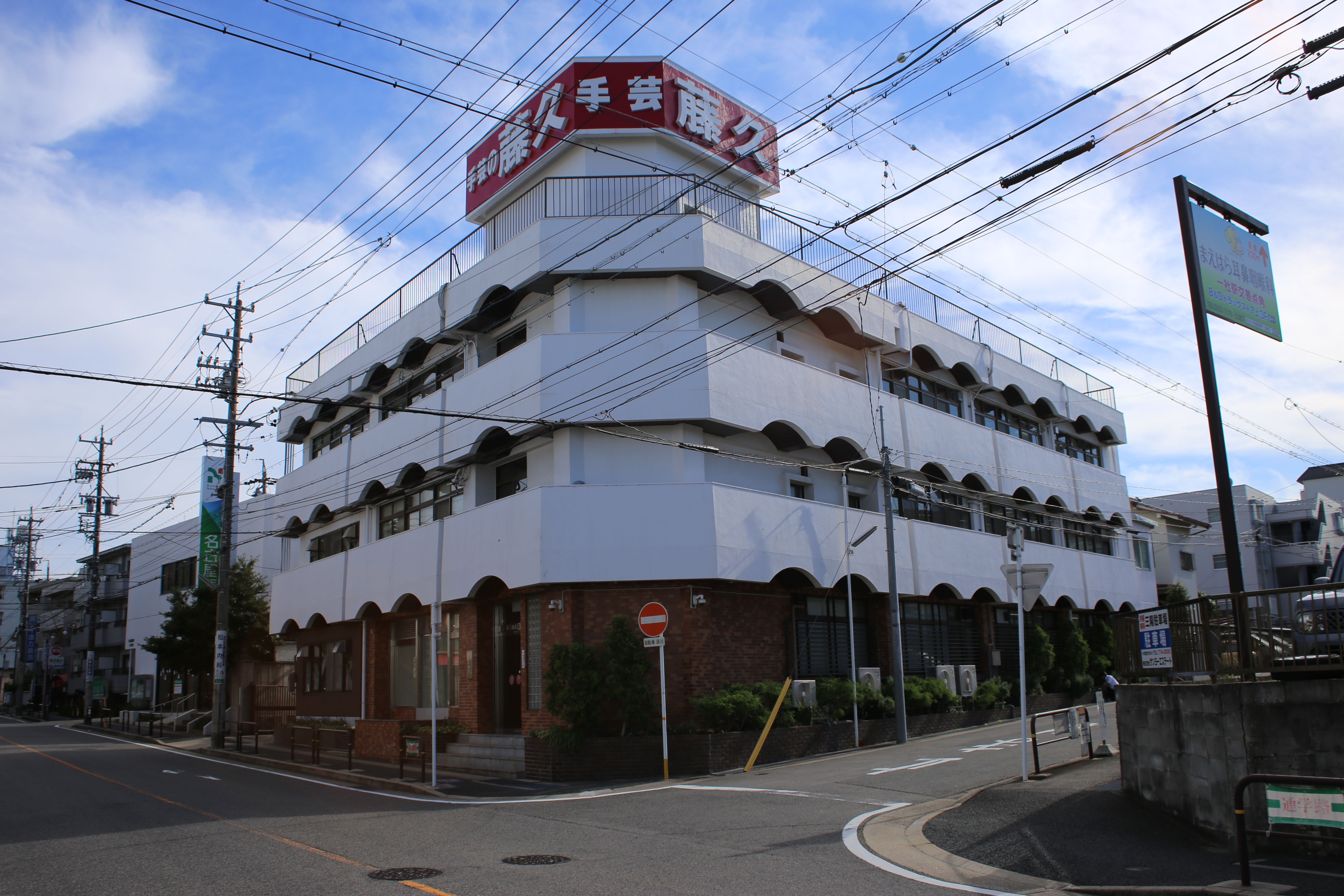 名古屋市名東区高社一丁目の藤久本社を東側公道北側より撮影